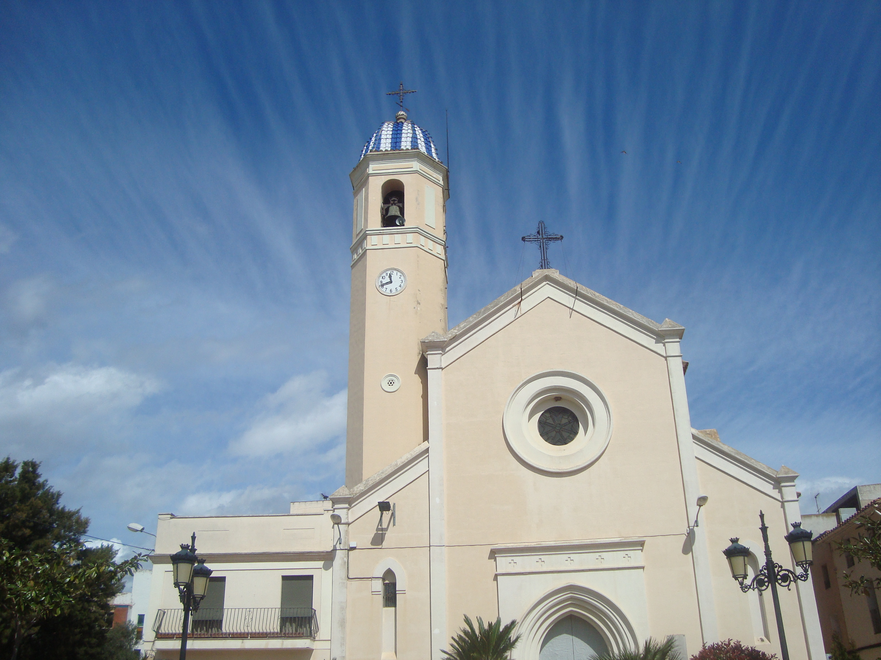 Església parroquial de Sant Joan Baptista (la Vall d'Alba) 05.124-001.